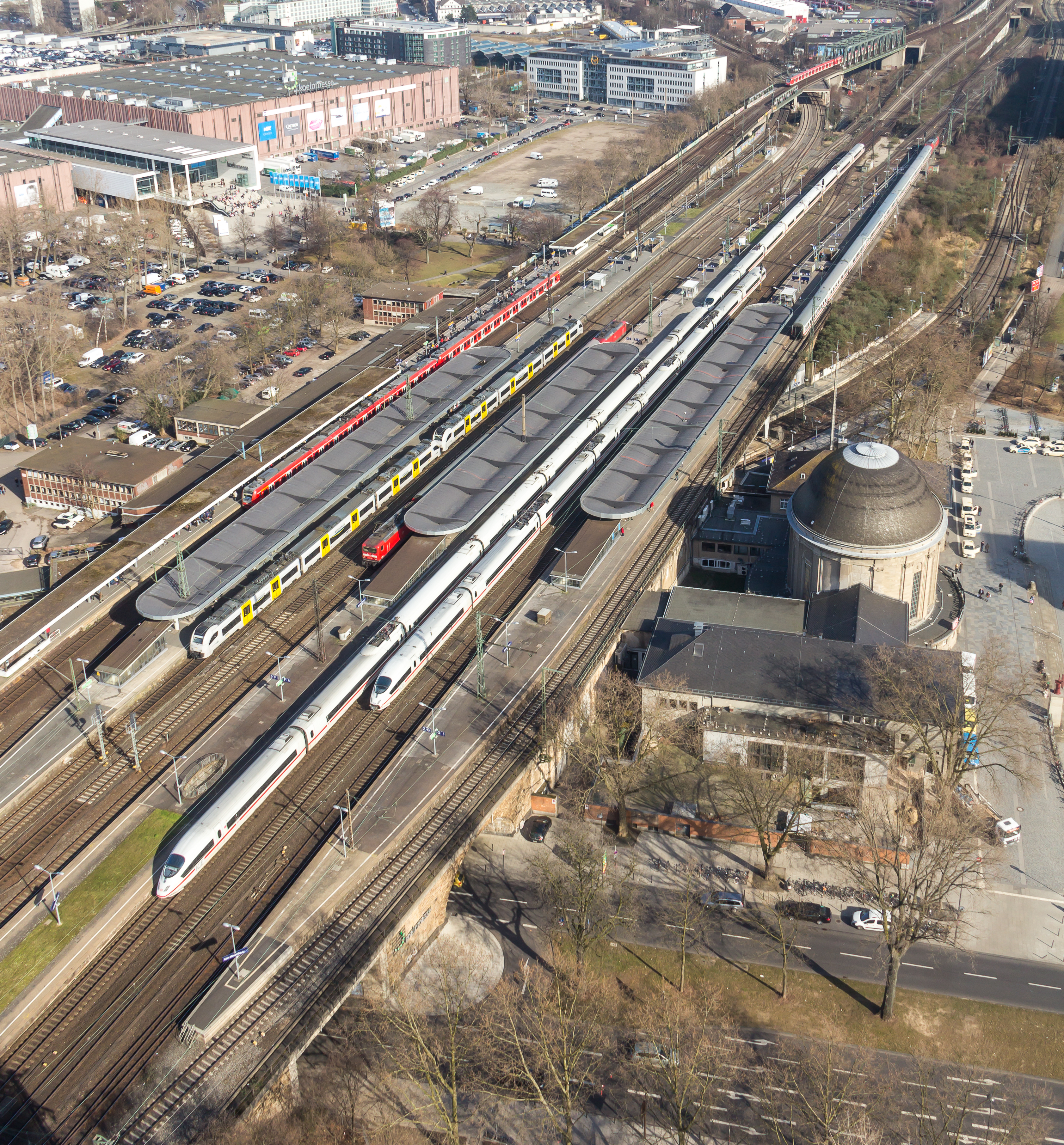 Bahnhof Köln Messe/Deutz. Blick vom KölnTriangle. Züge im Bahnhof von links nach rechts: S-Bahn, MRB, RB 27, doppelter ICE, einfacher ICE, IC